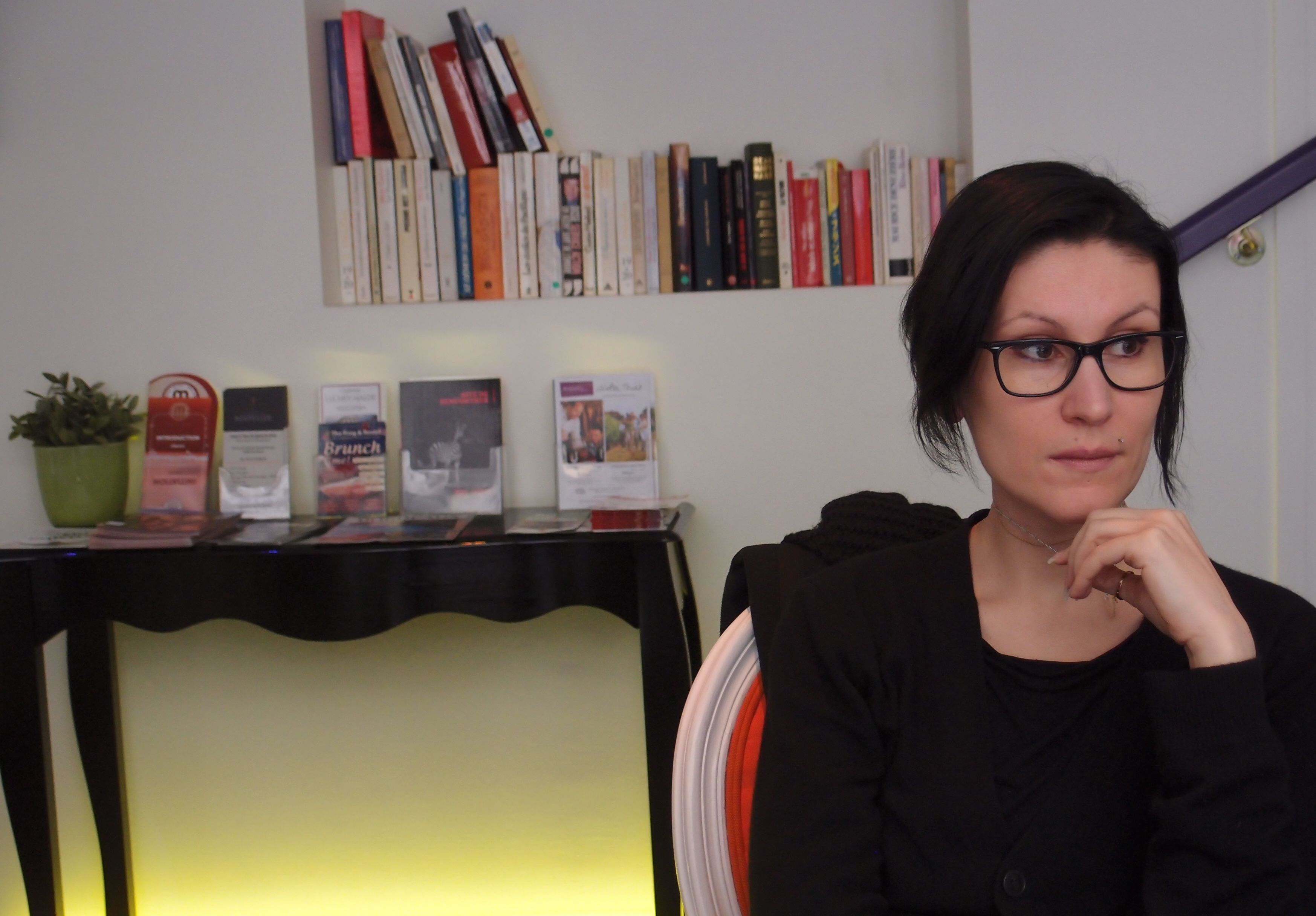 Ovidie, réalisatrice et ancienne actrice de films pornographiques